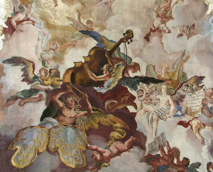 Deckenfresko Klosterkirche Uetersen 2007